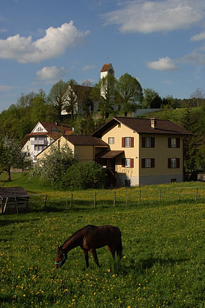 Blick zur Kirche von Diegten